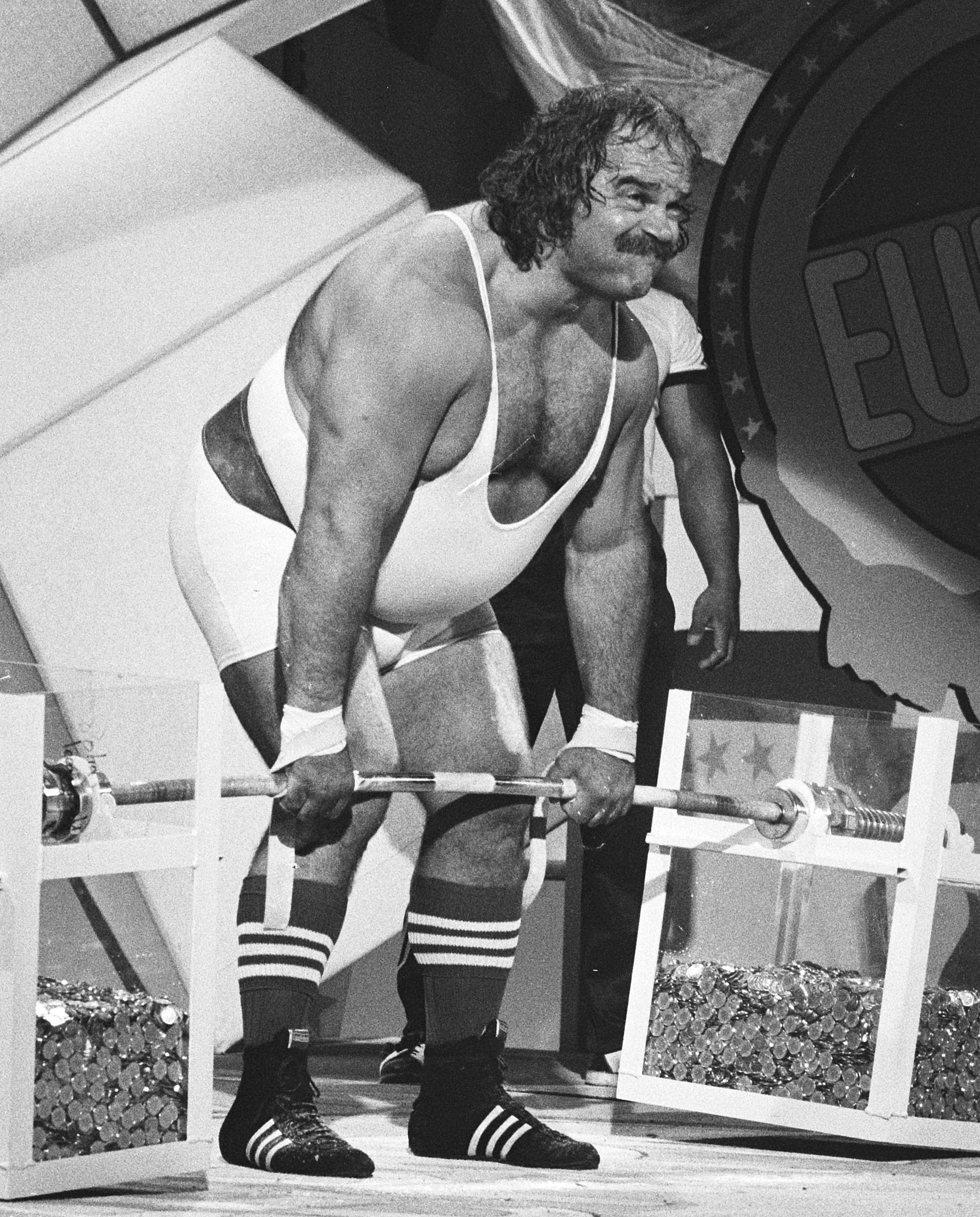 TV-opnamen AVRO voor "Sterkste man van Europa" in de RAI (tijdens Firato); Nederlander Gerard du Prie tijdens het "guldens tillen"